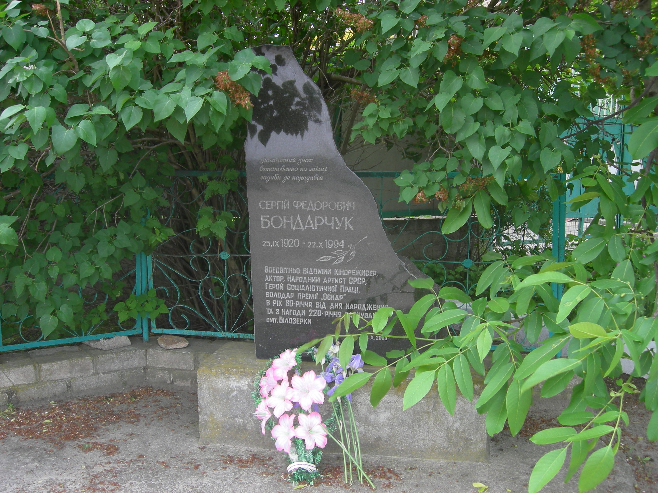 Памятный камень. Установлен в селе Белозерка, Херсонская область, Украина.